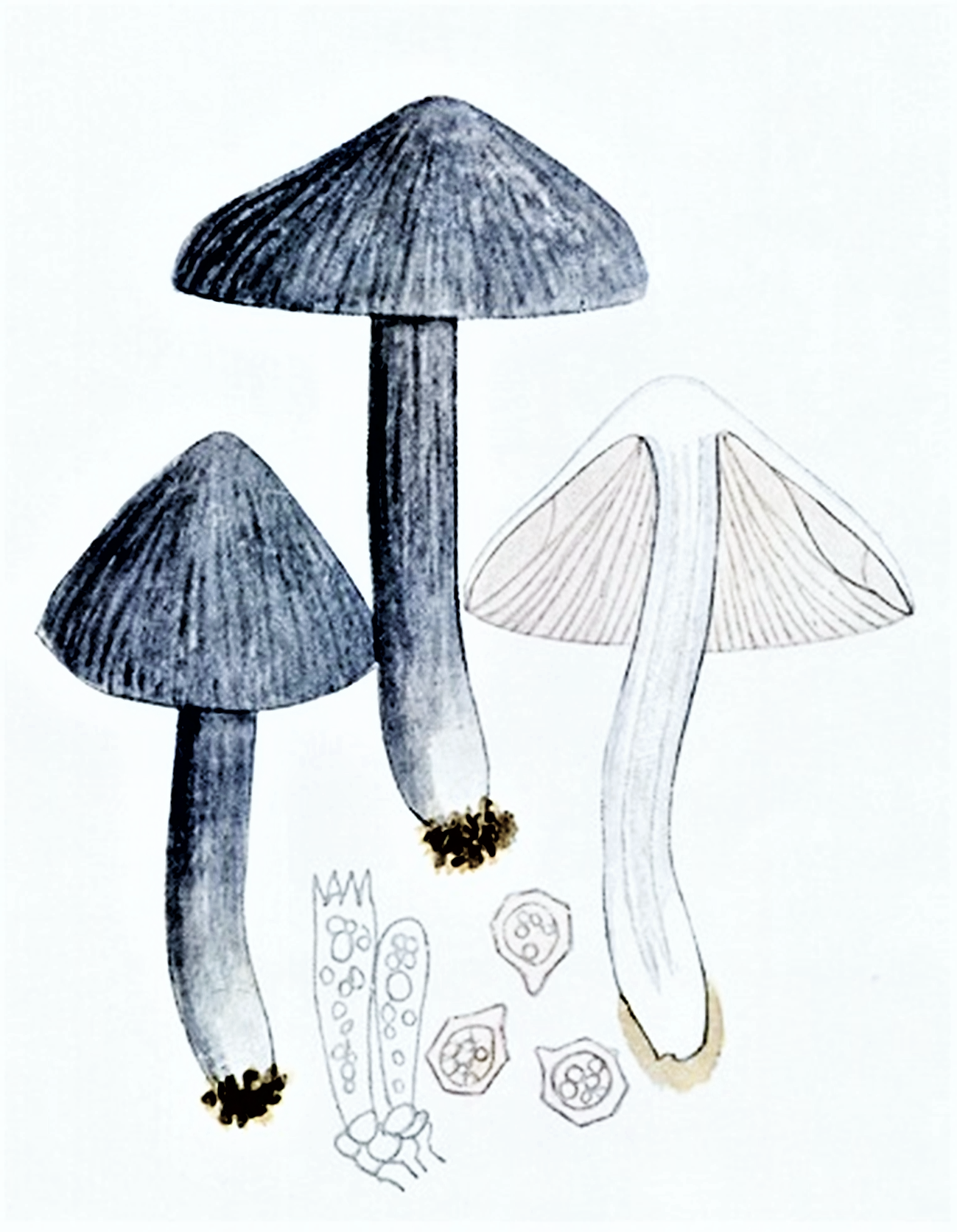 Giacomo Bresadola: Entoloma nitidum Quél., 1883), Syn. Rhodophyllus nitidus |Quél. (1886)